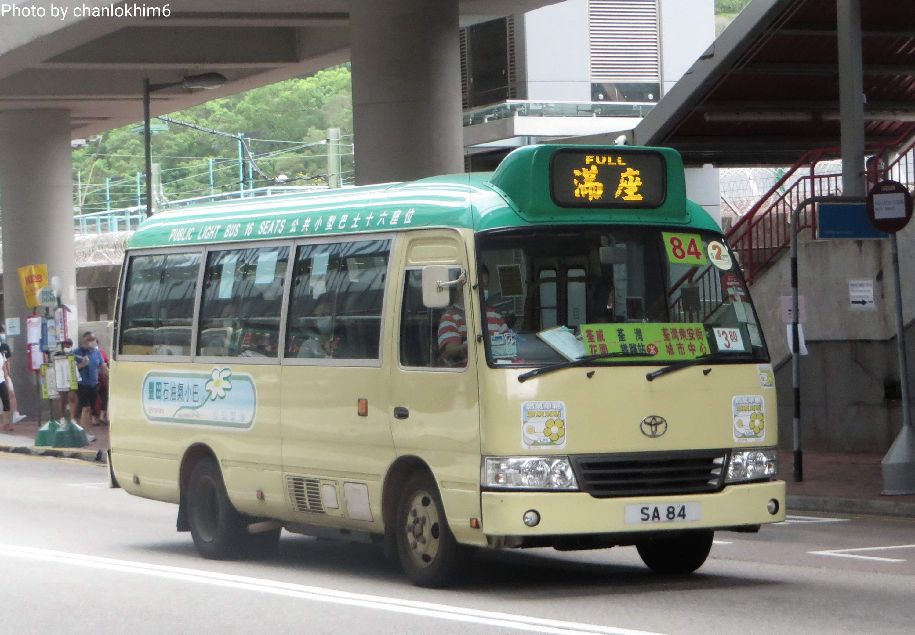 中文（中国大陆）: 小巴SA84的照片